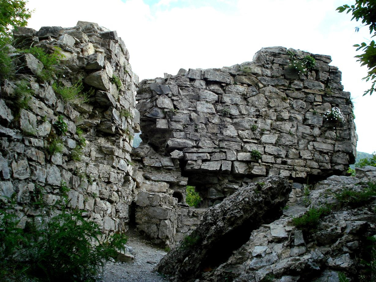 Стены крепости "Гялярсян - Гёрярсян"